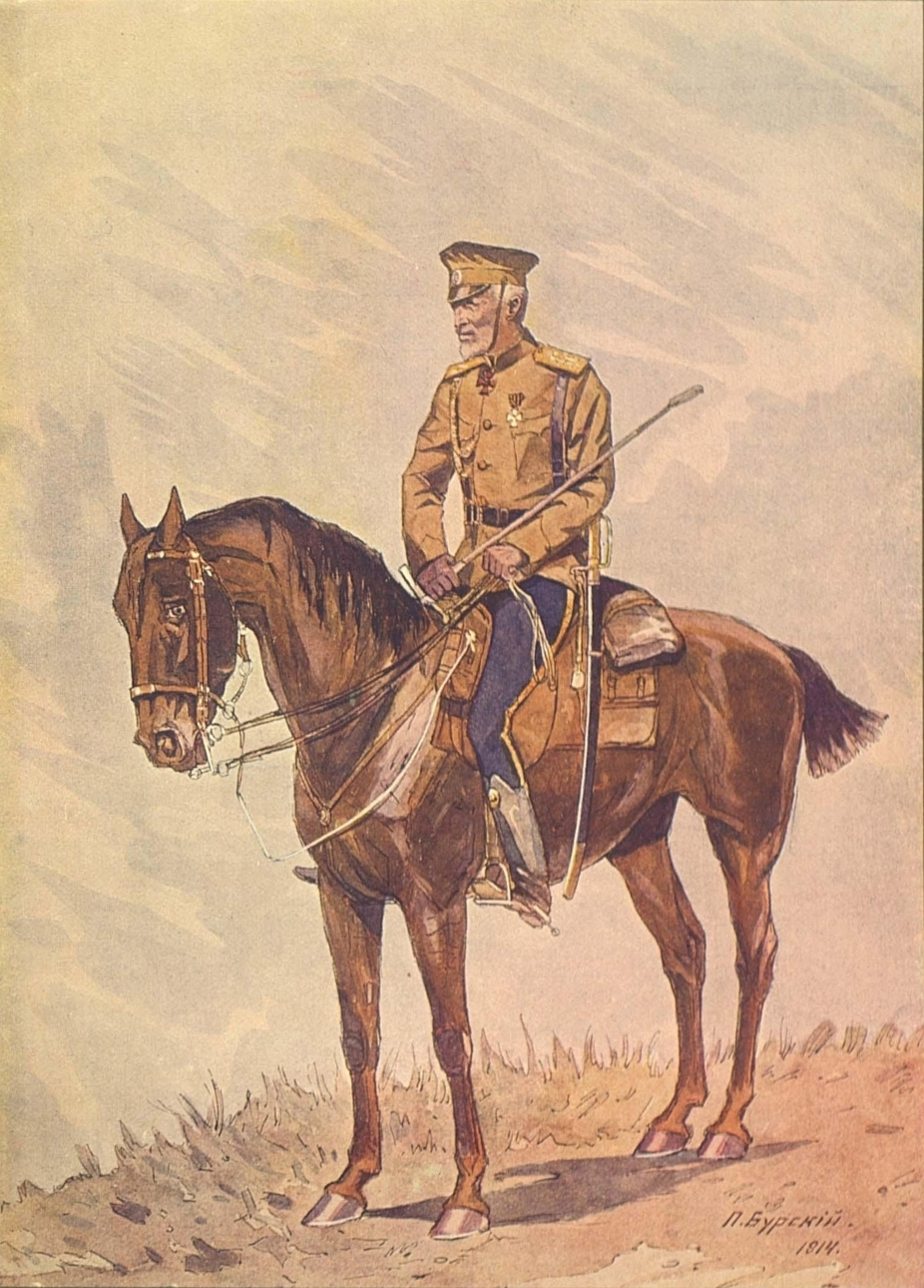 Великий князь Николай Николаевич младший верхом.